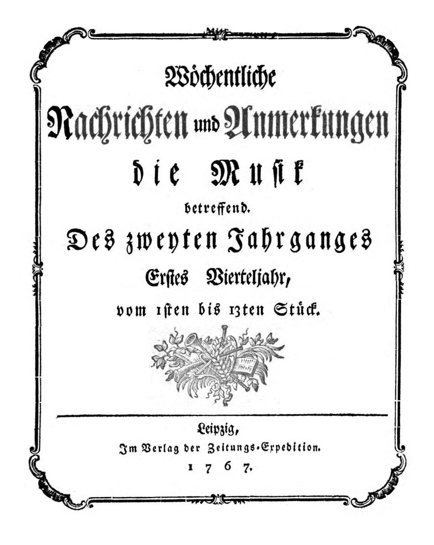 Titelseite der Zeitschrift / Title page of the periodical.